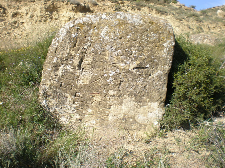 Cupa dedicada a Chresima por Sempronio Paramithio. CIL II 6338aa = ERZaragoza 28 = HEp 2011, 668 = AE 1977, 475 = AE 2011, 528: D(is) M(anibus) [s(acrum)] / Chresime / Semp(ronius) Paramy/thius uxori / pientissim(a)e / f(aciendum) c(uravit)